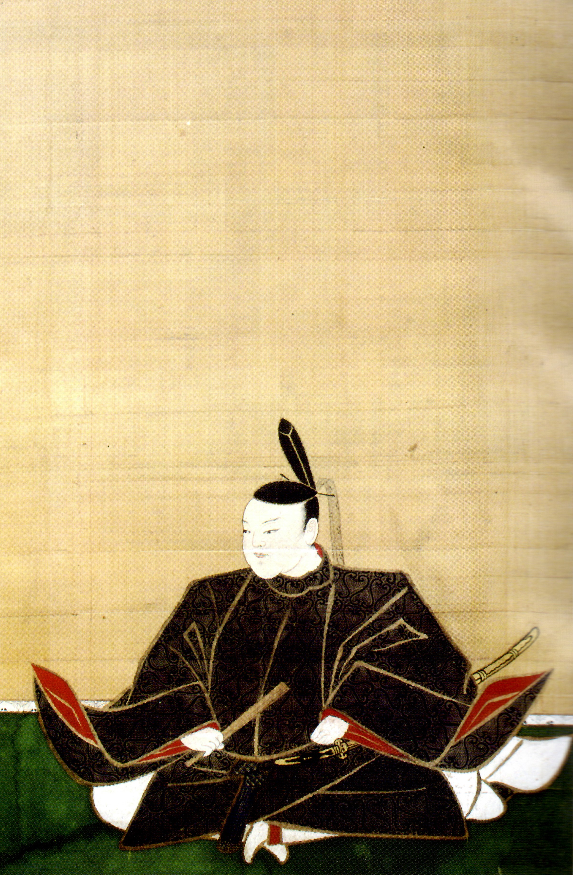 九鬼隆国の肖像。